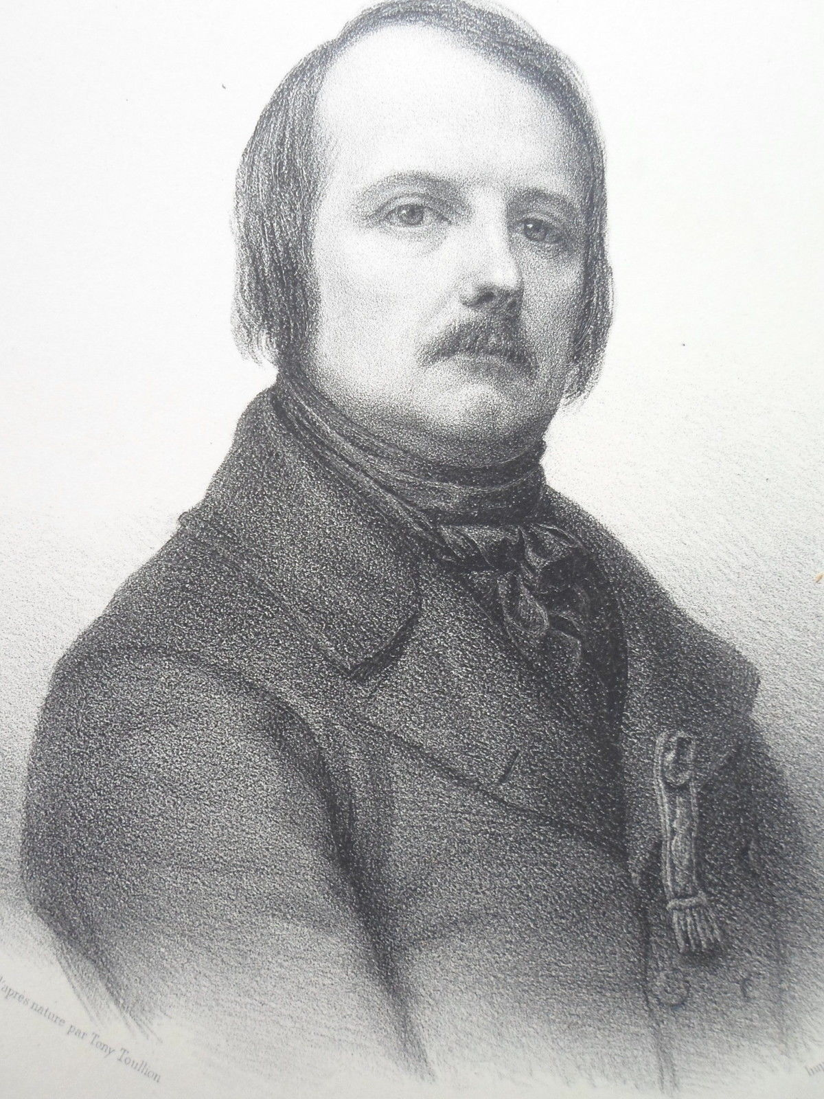 Edgar Quinet par Tony Toullion. Extrait de République française. Assemblée nationale. 1848. Galerie des représentants du peuple. 900 portraits ... lithographiés d'après nature ...